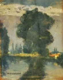 Nicolae Gropeanu (1865 - 1936) - Pasel pe lemn